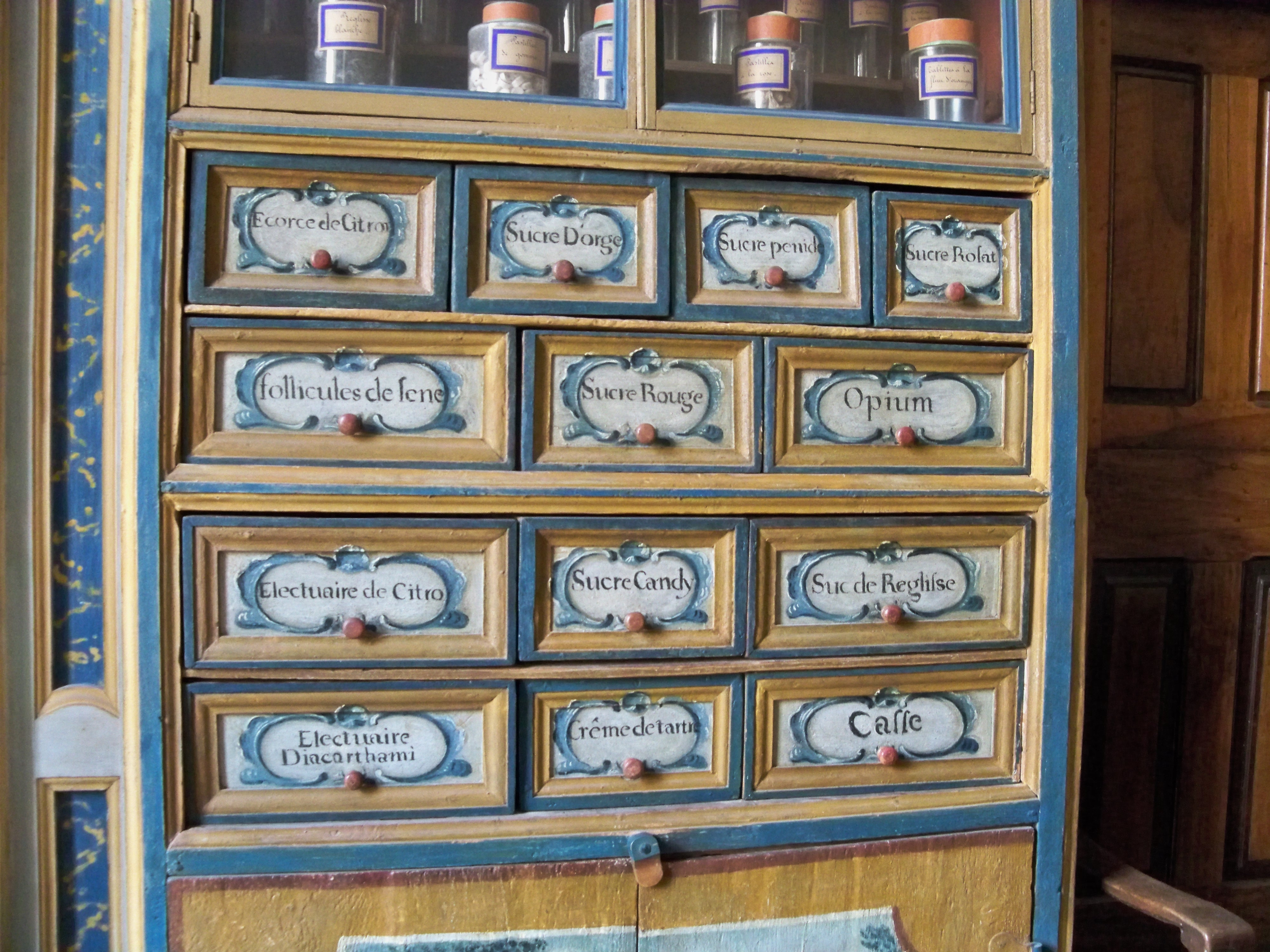 Décor de la pharmacie de l'hôtel dieu de Carpentras, peint par Joseph Siffred Duplessis